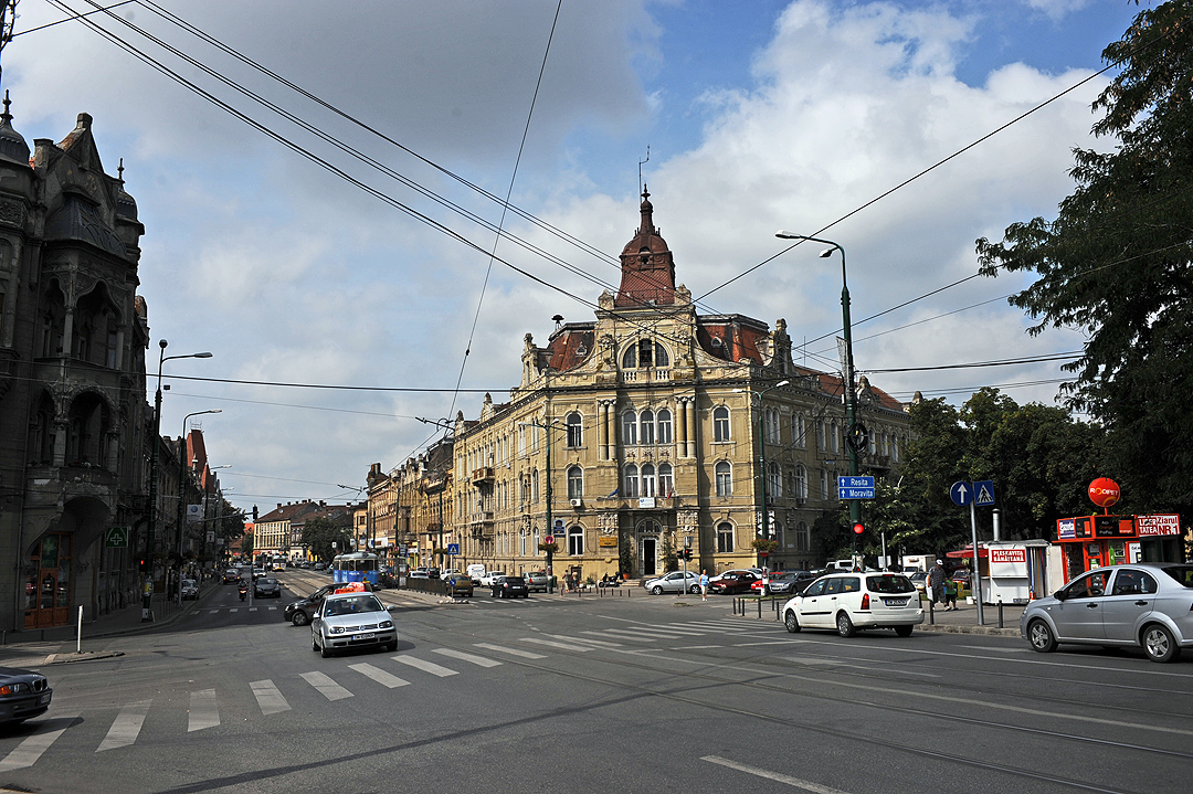 Palat pe splaiul Tudor Vladimiresc